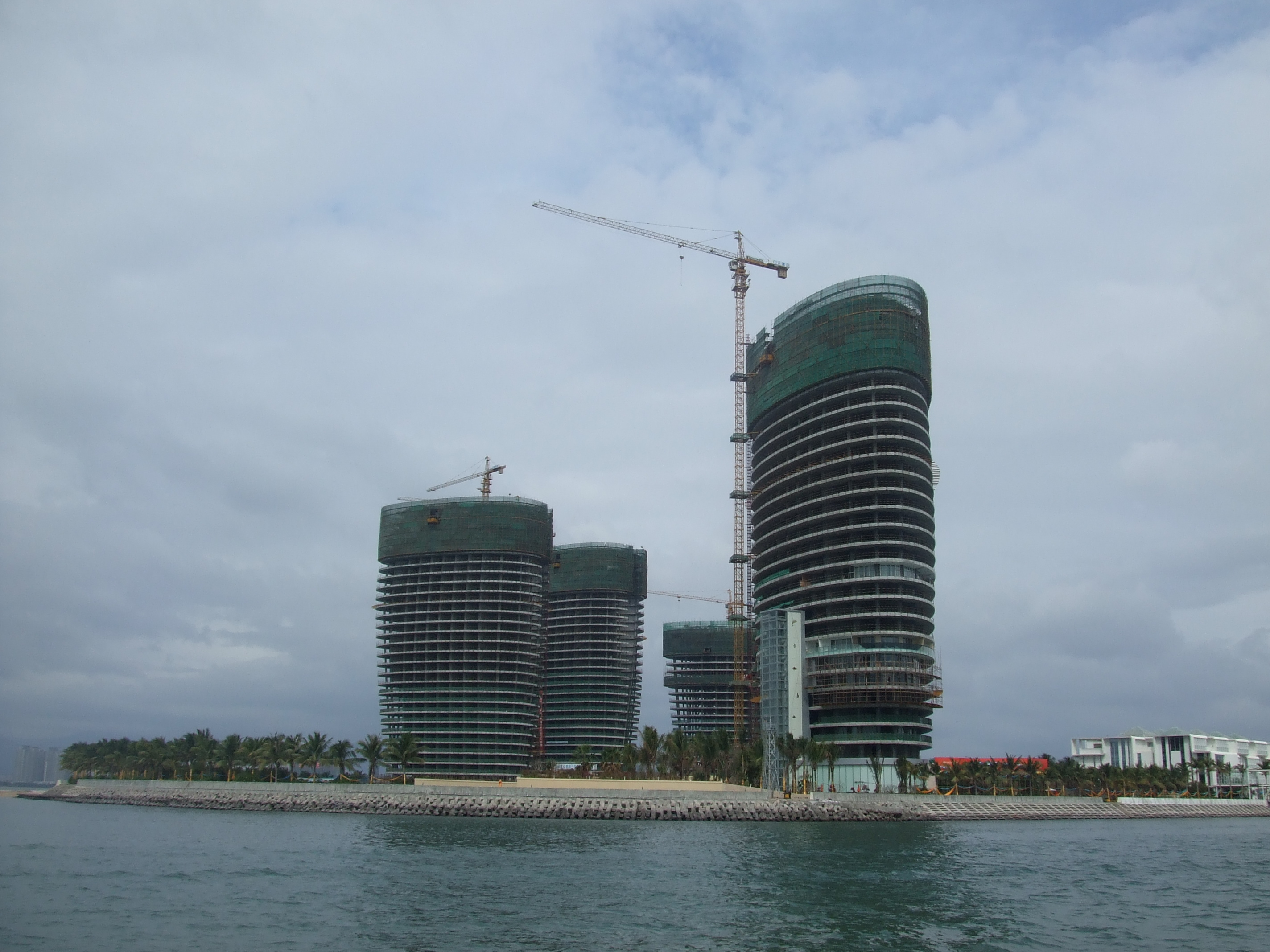 海南-建设中的三亚凤凰岛